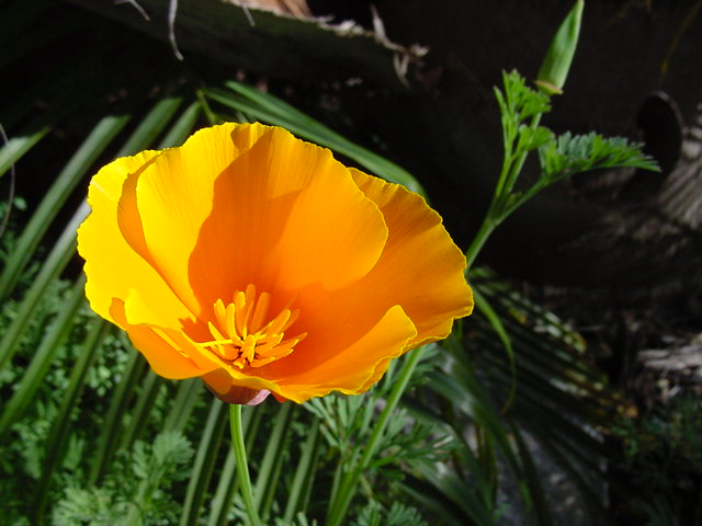 Eschscholzia californica